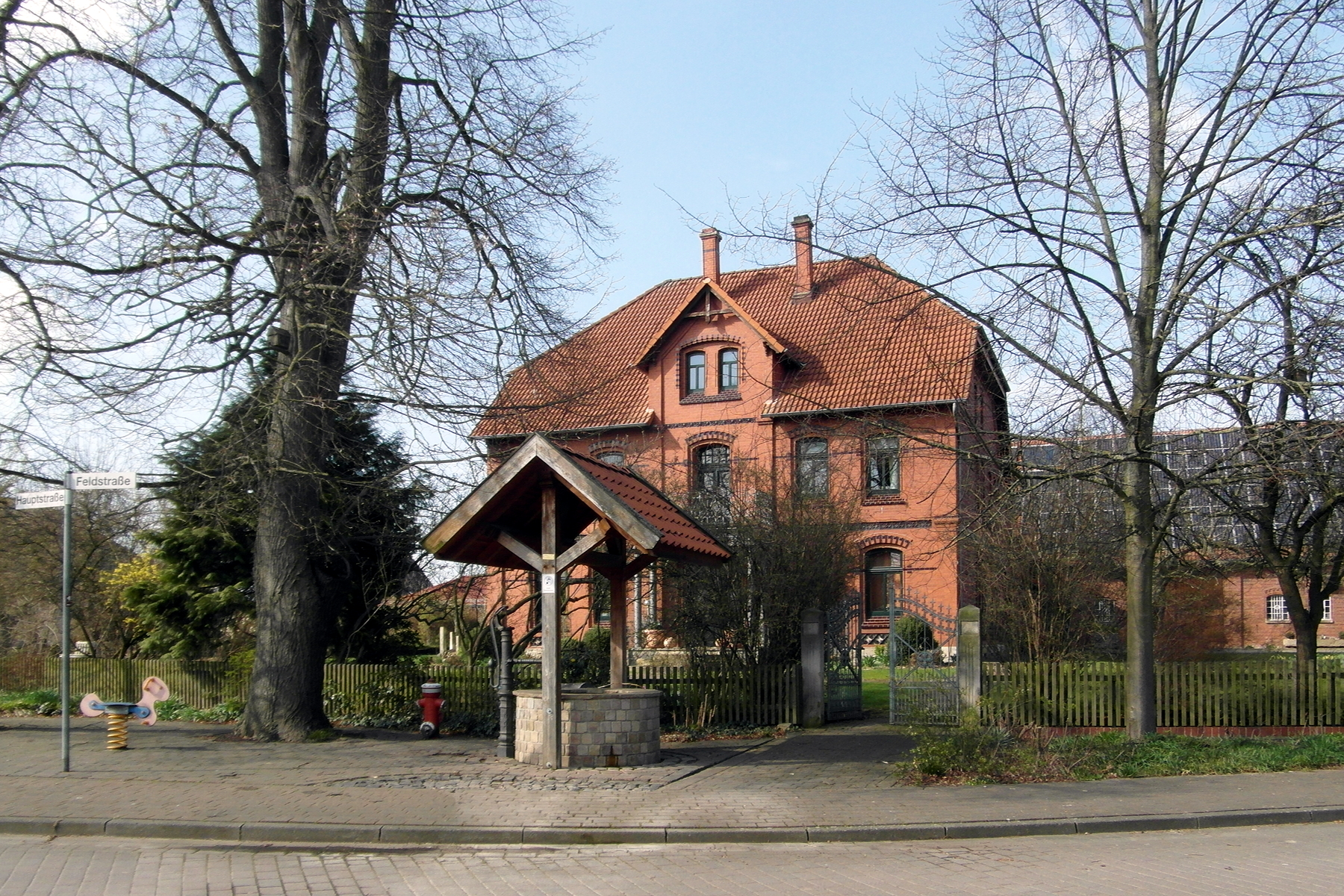 Brunnen, Spielplatz in der Ortsmitte von Helsinghausen, Gemeinde Suthfeld im Landkreis Schaumburg.